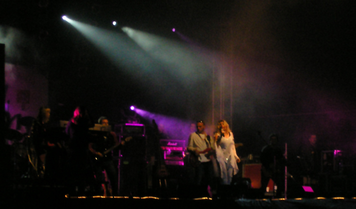 Bajm podczas koncertu w Żaganiu, wrzesień 2005.